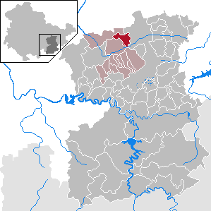 Lausnitz in Thuringia - Saale-Orla-Kreis